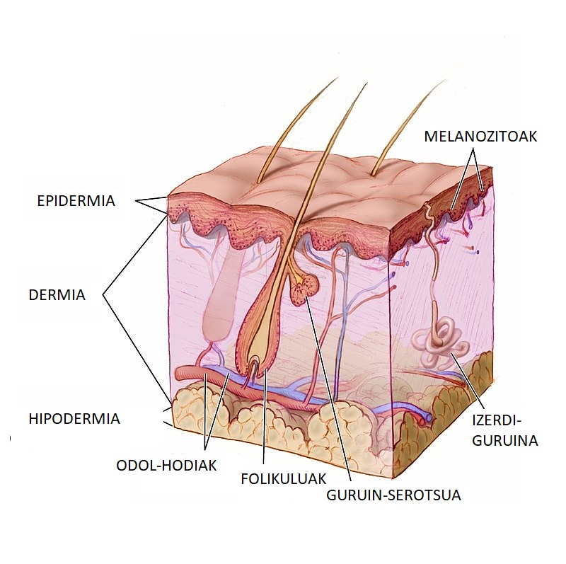 Larruazalaren eskema. Translation from File:Anatomy The Skin - NCI Visuals Online.jpg